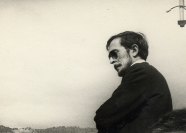 Rodrigo Emílio